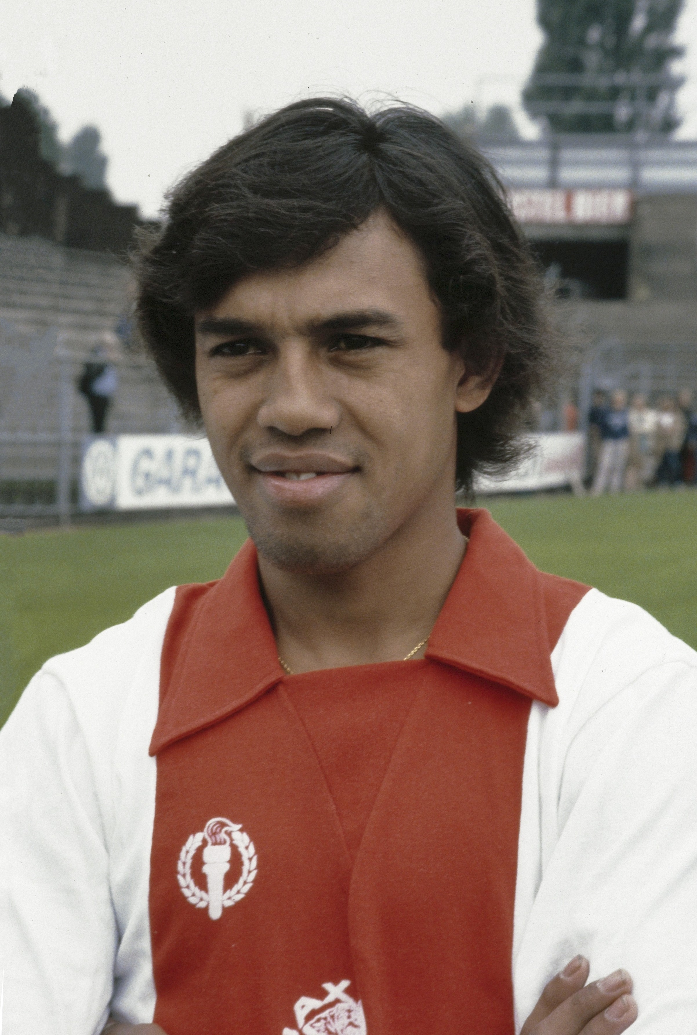 Presentatie Ajax selectie 1979/1980, Simon Tahamata